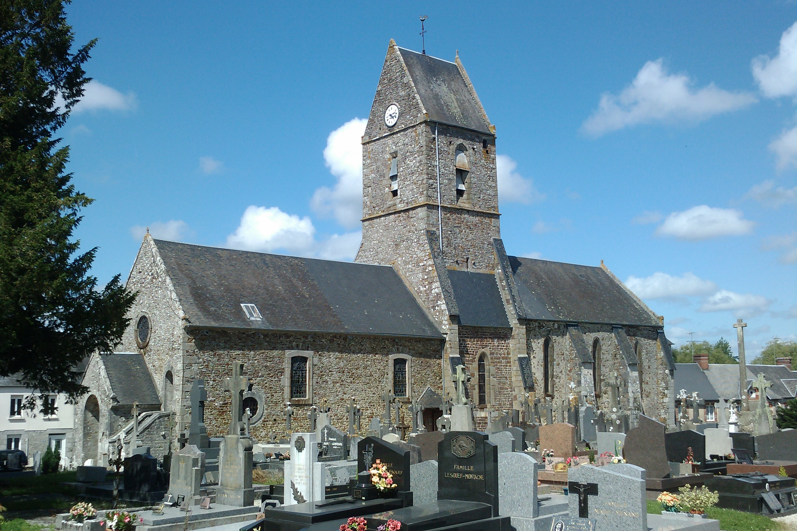 Église Saint-Germain de Trelly